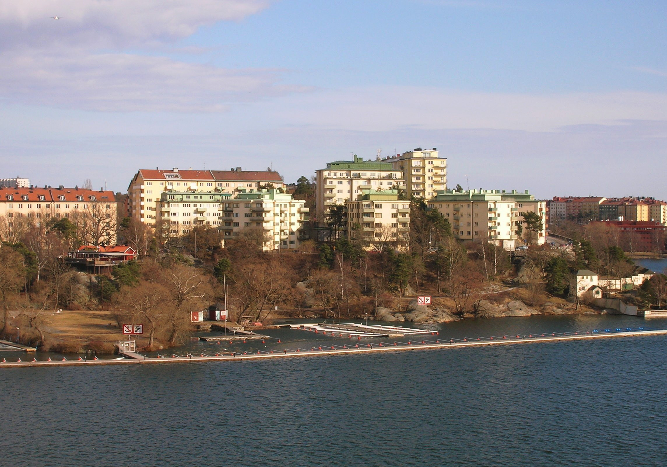 Fredhäll seen from Tranebergsbron, Stockholm municipality, Stockholm County